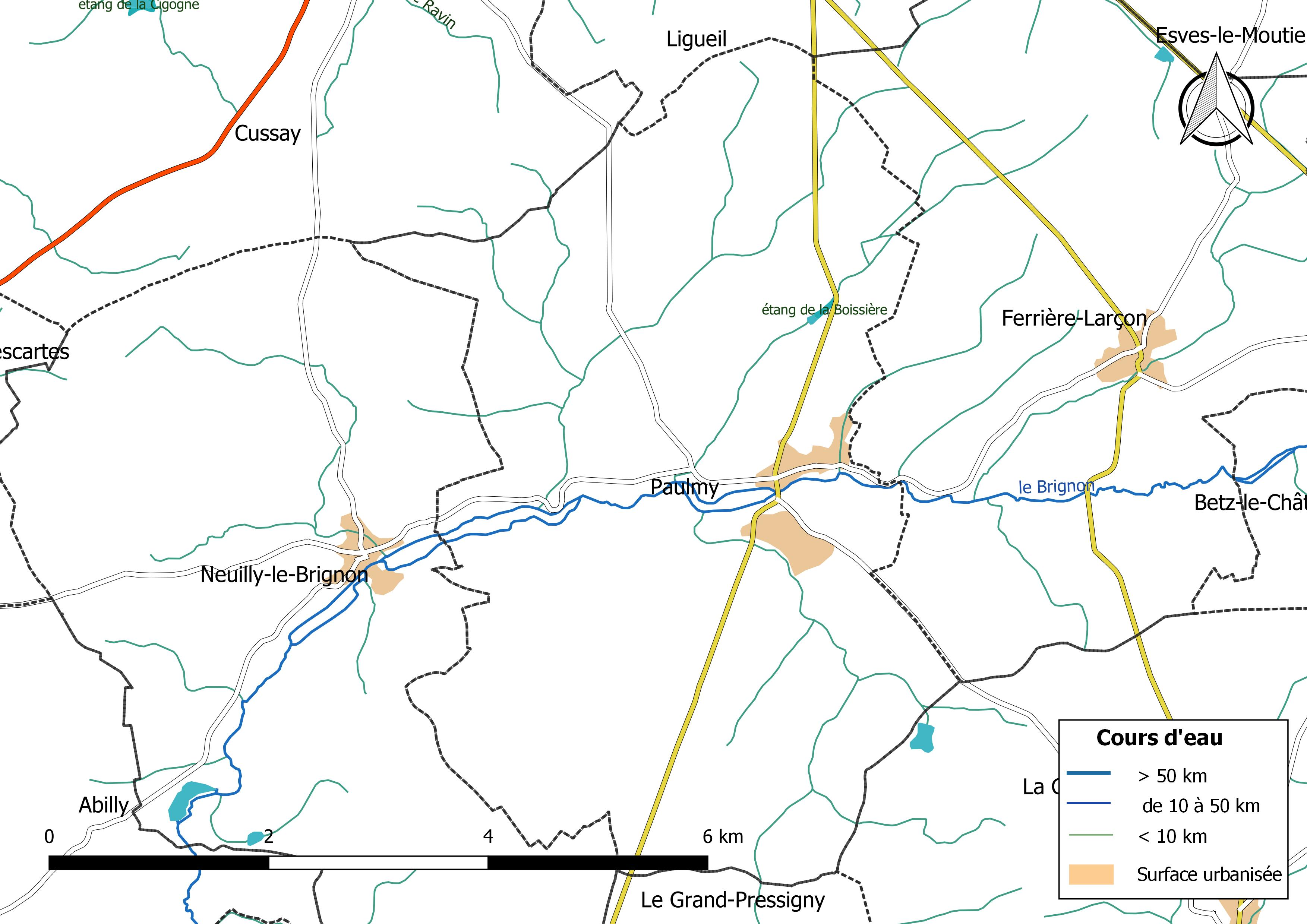 Carte du réseau hydrographique de la commune de Paulmy (France).